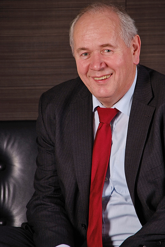 Rolf Meyer, Landtagsabgeordneter Niedersachsen, 16. Wahlperiode (Fotoprojekt Landtagsabgeordnete Niedersachsen am 24. und 25. November 2009)